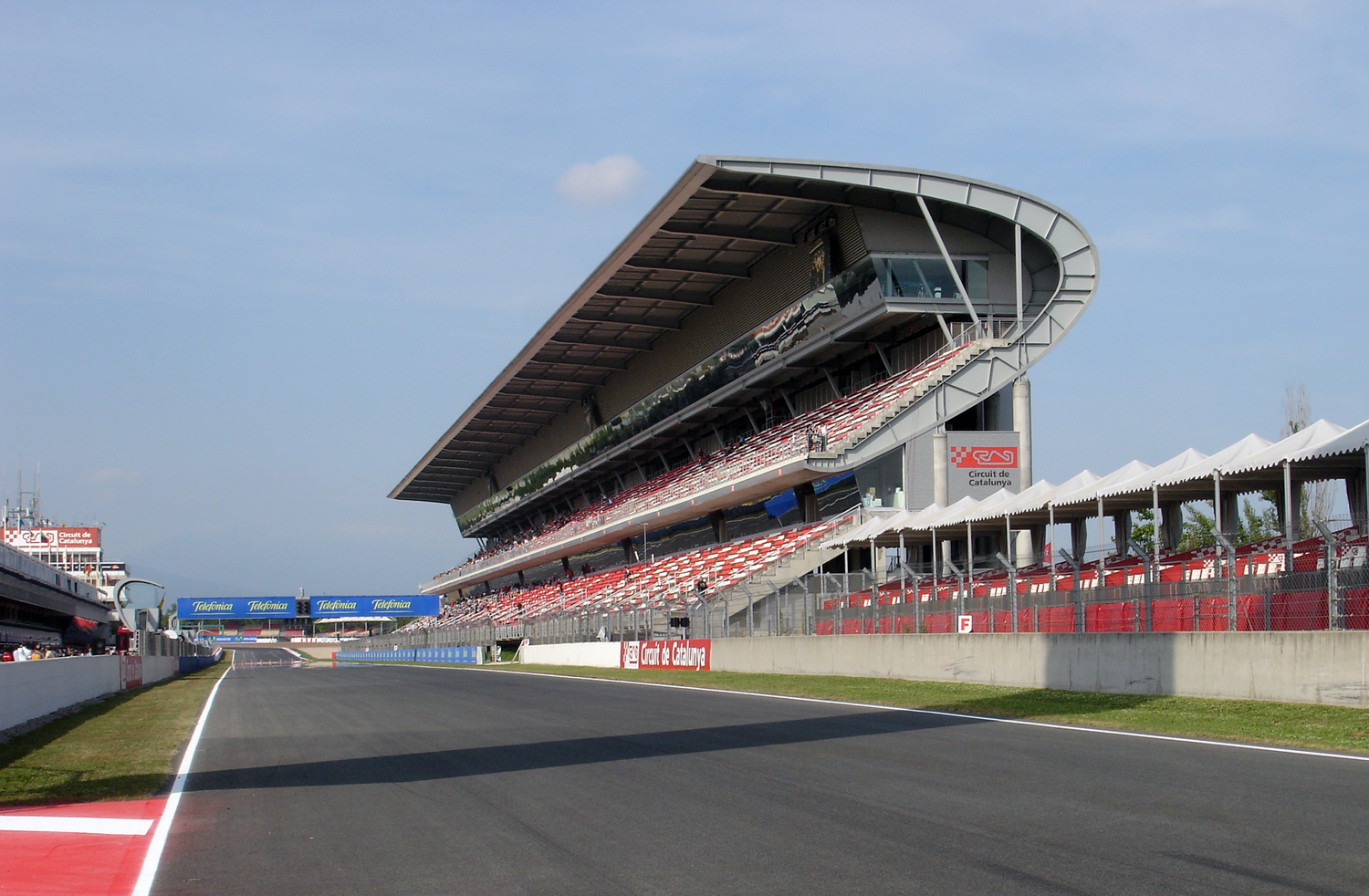 F1 - Tribuna del Circuit de Catalunya